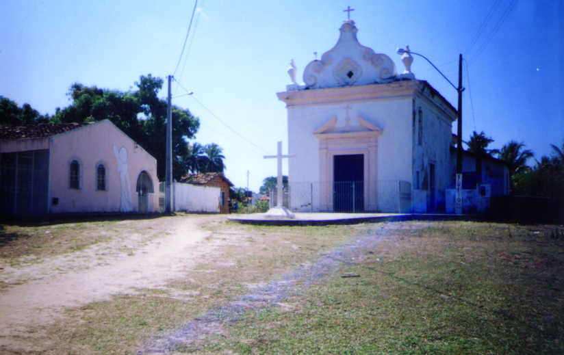 Foto que tirei em Salinas da Margarida no recôncavo baiano no Brasil Brazil, mas não sabia que estava na verdade em conceição...